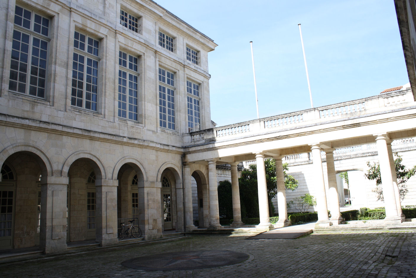 Photo de la cour intérieure de la Chambre de Commerce de La Rochelle